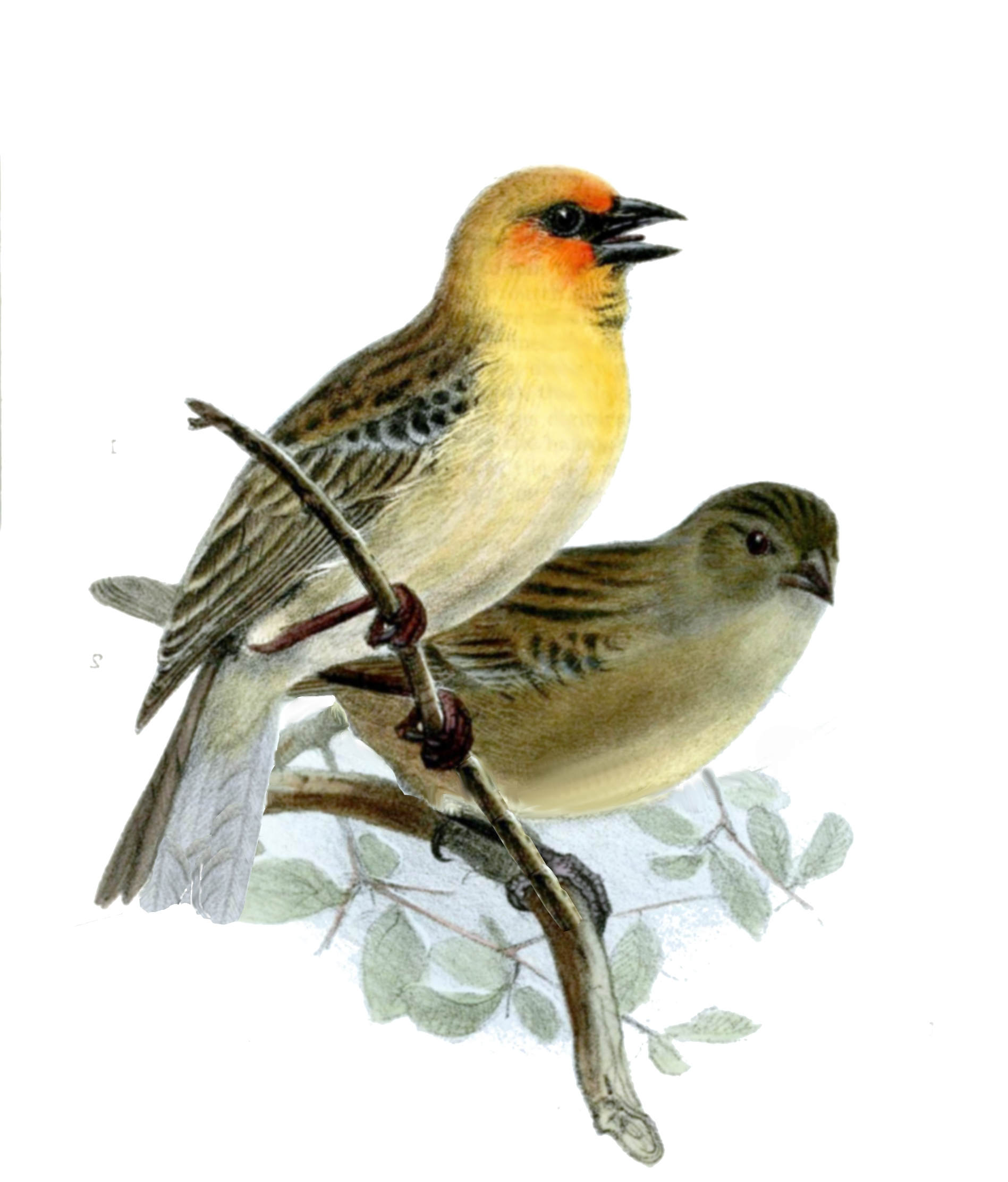 Foudia flavicans